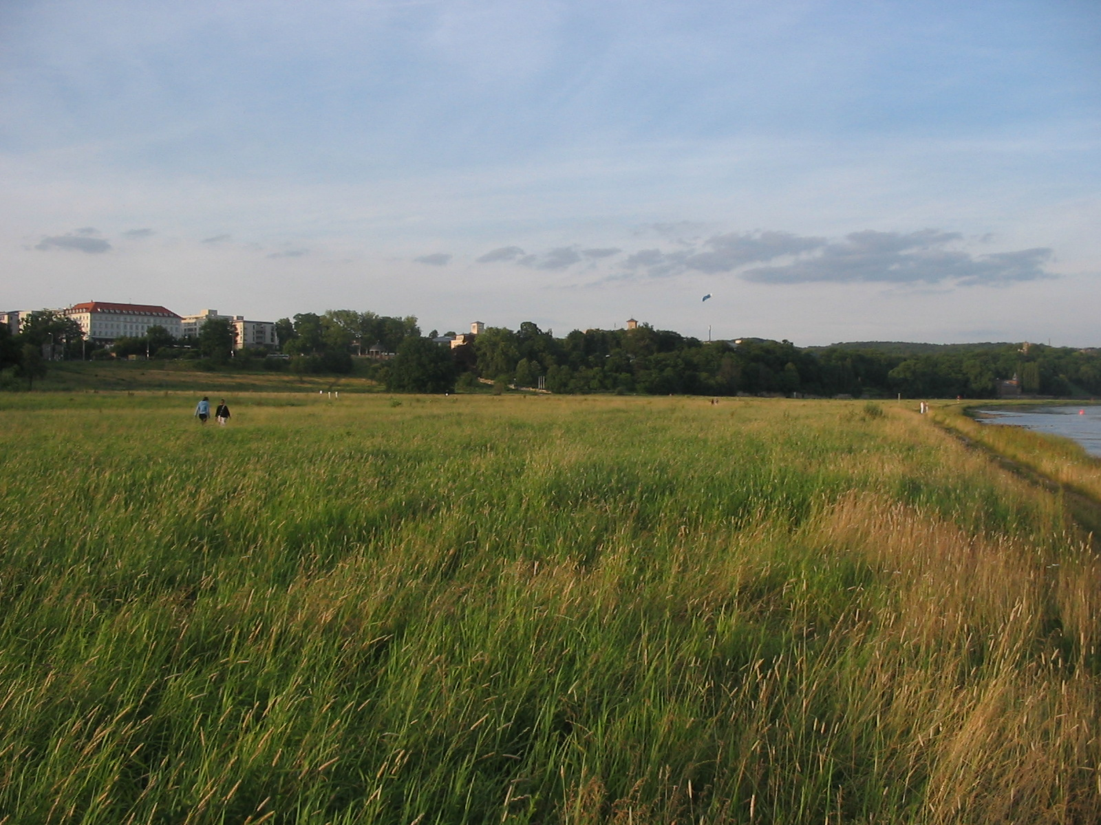 Die Elbwiesen in Dresden unterhalb des Waldschlösschens.